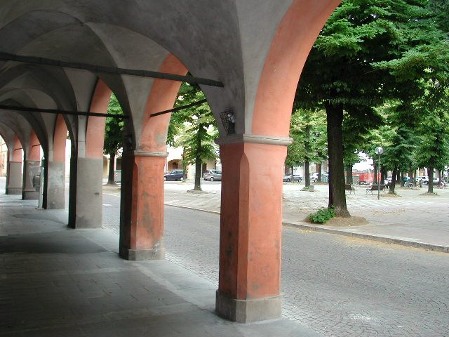 Reggio Emilia Piazza Fontanesi immagine scatatta da me nel giugno 2004 e rialsciata sotto licenza Gnu